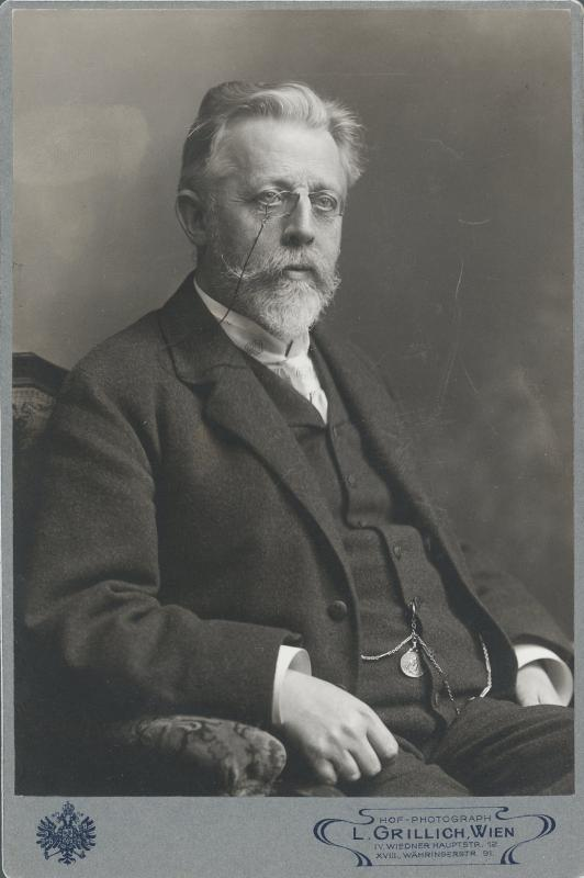 Urbantschitsch, Viktor, Facharzt für Hals-, Nasen- und Ohrenheilkunde, Vater von Rudolf Urbantschitsch.